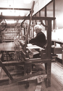 Das aktive Museum der Handweberei in Geltow zeigt zehn alte Webstühle, der älteste ist 200 Jahre alt. Es kann das Handweben mit Leinen (auch anderen Naturfasern) besichtigt werden, die Geschichte des Leinens und die Geschichte des handwebens wird gezeigt.